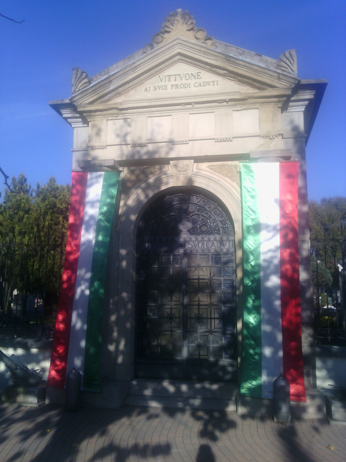 Cappella dei Caduti presso il cimitero di Vittuone (MI) - Italy